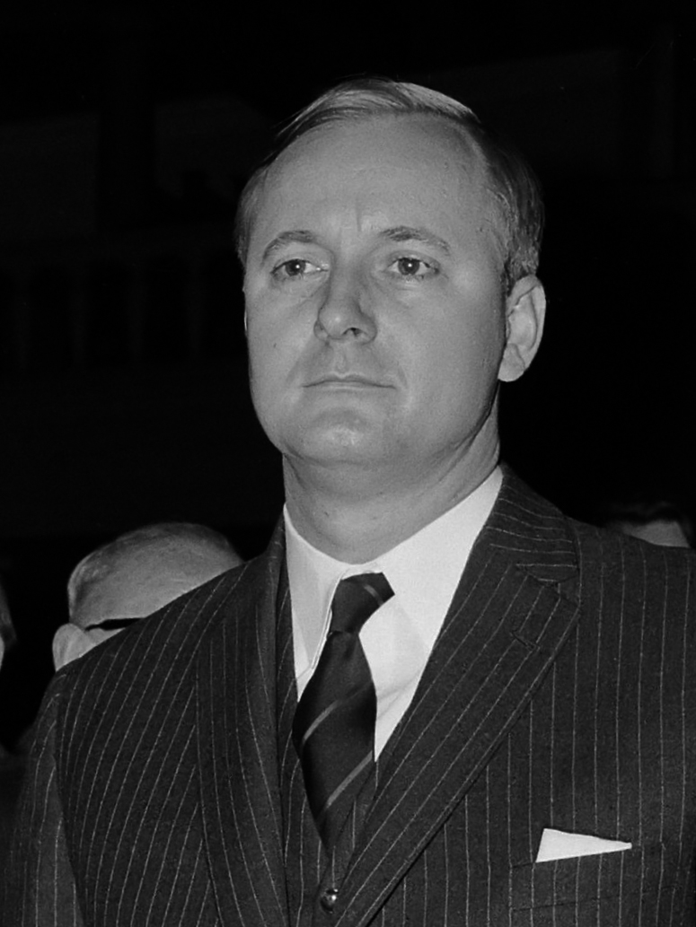 175-jarig bestaan van het Genootschap ter bevordering van natuur-, genees- en heelkunde. Drie medailles uitgereikt aan v.l.n.r. professor doctor Britton, professor doctor J.D. van der Waals en doctor Willem H. Brummelkamp 24 november 1965